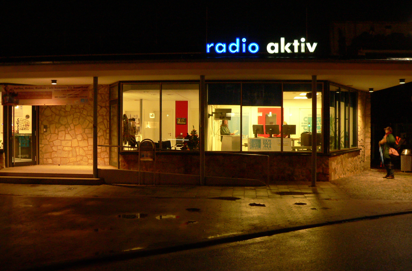 Sendegebäude Radio aktiv